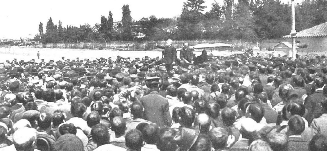 Pablo Iglesias dirigiendo la palabra á los obreros antes de disolverse la manifestación. (FOTS. NUEVO MUNDO, POR CAMPÚA).